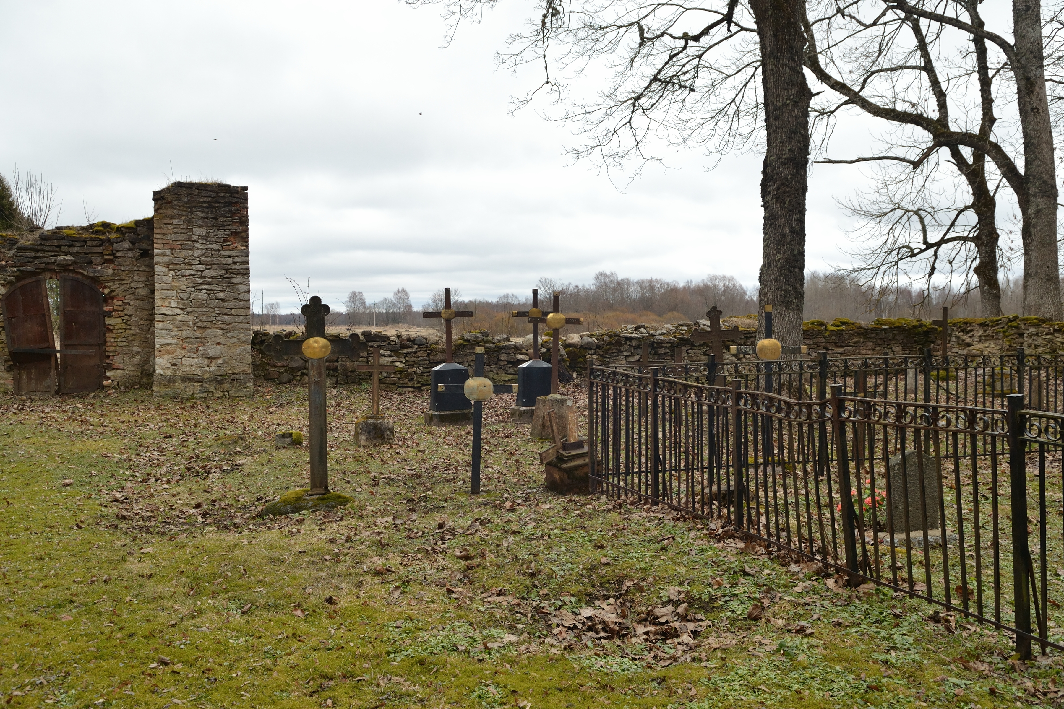 Simuna kirikuaed